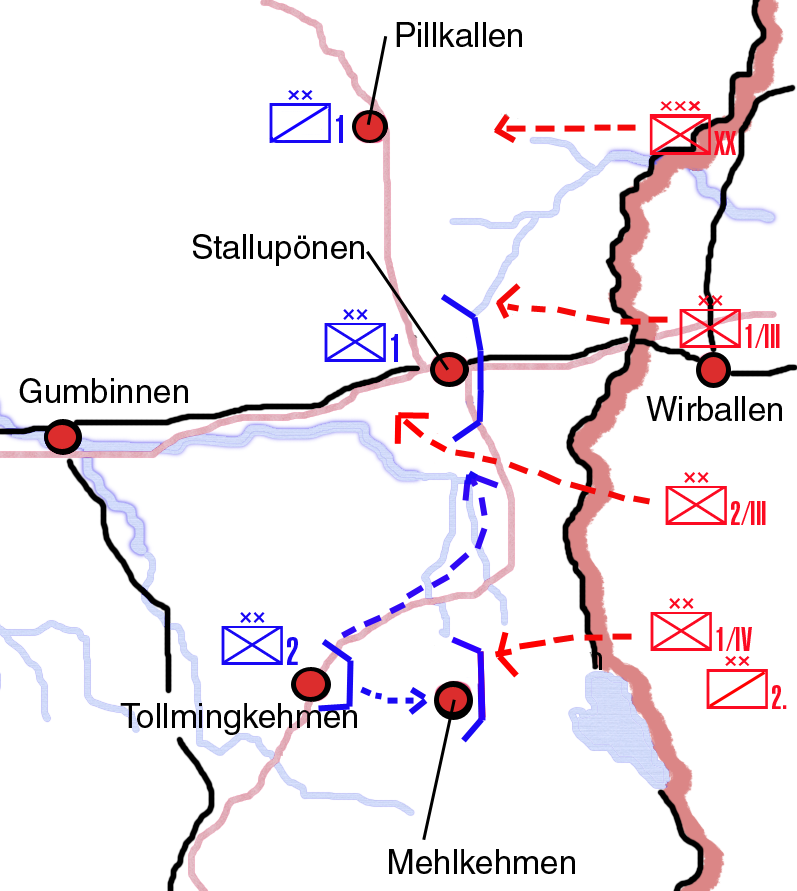 Slaget ved Stallupönen i Østprøjsen den 17. august 1914.